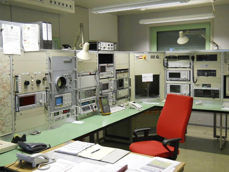 Funkmessstelle